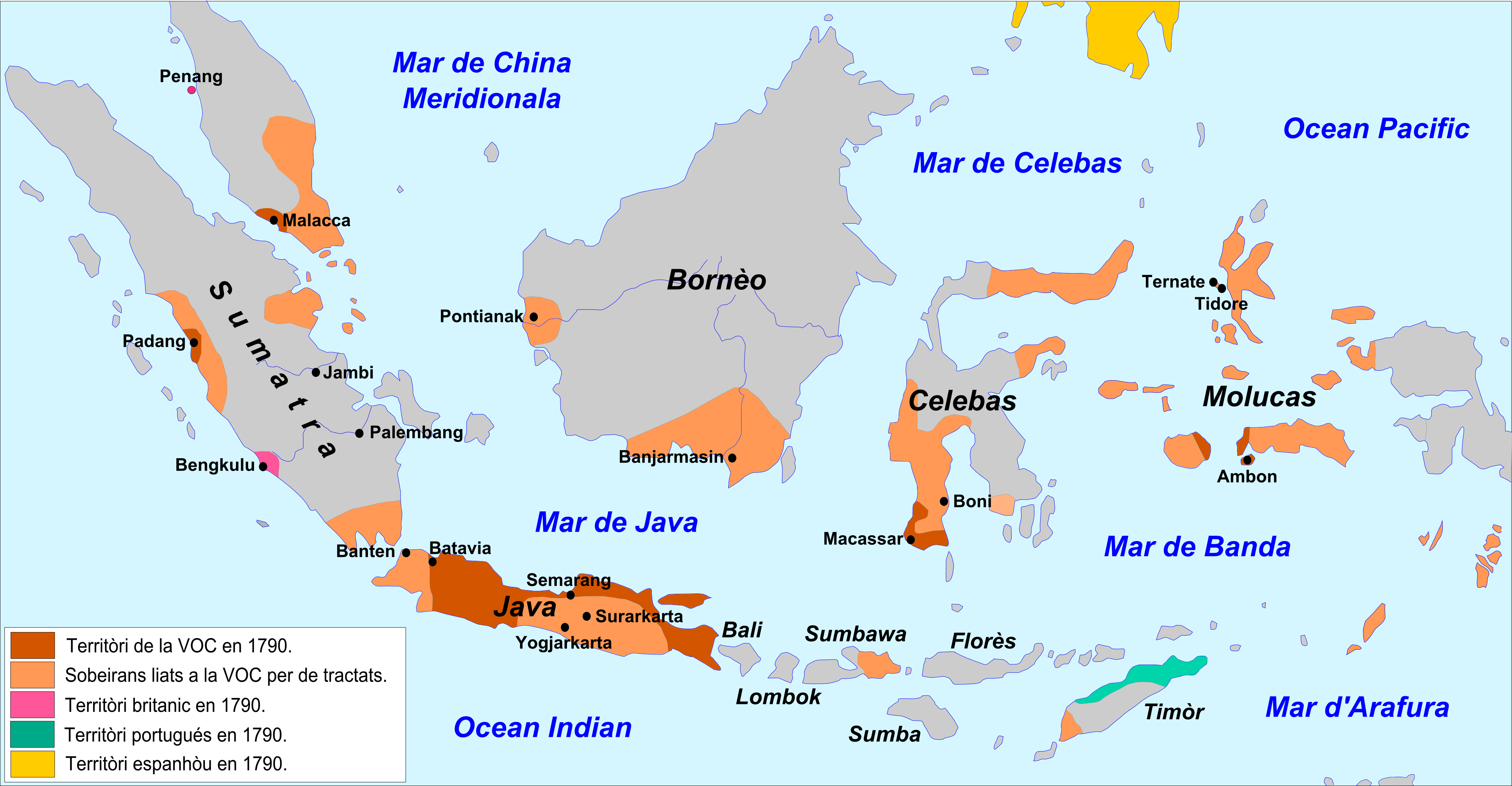 Implantacion de la VOC dins lo Sud-Èst Asiatic en 1790.